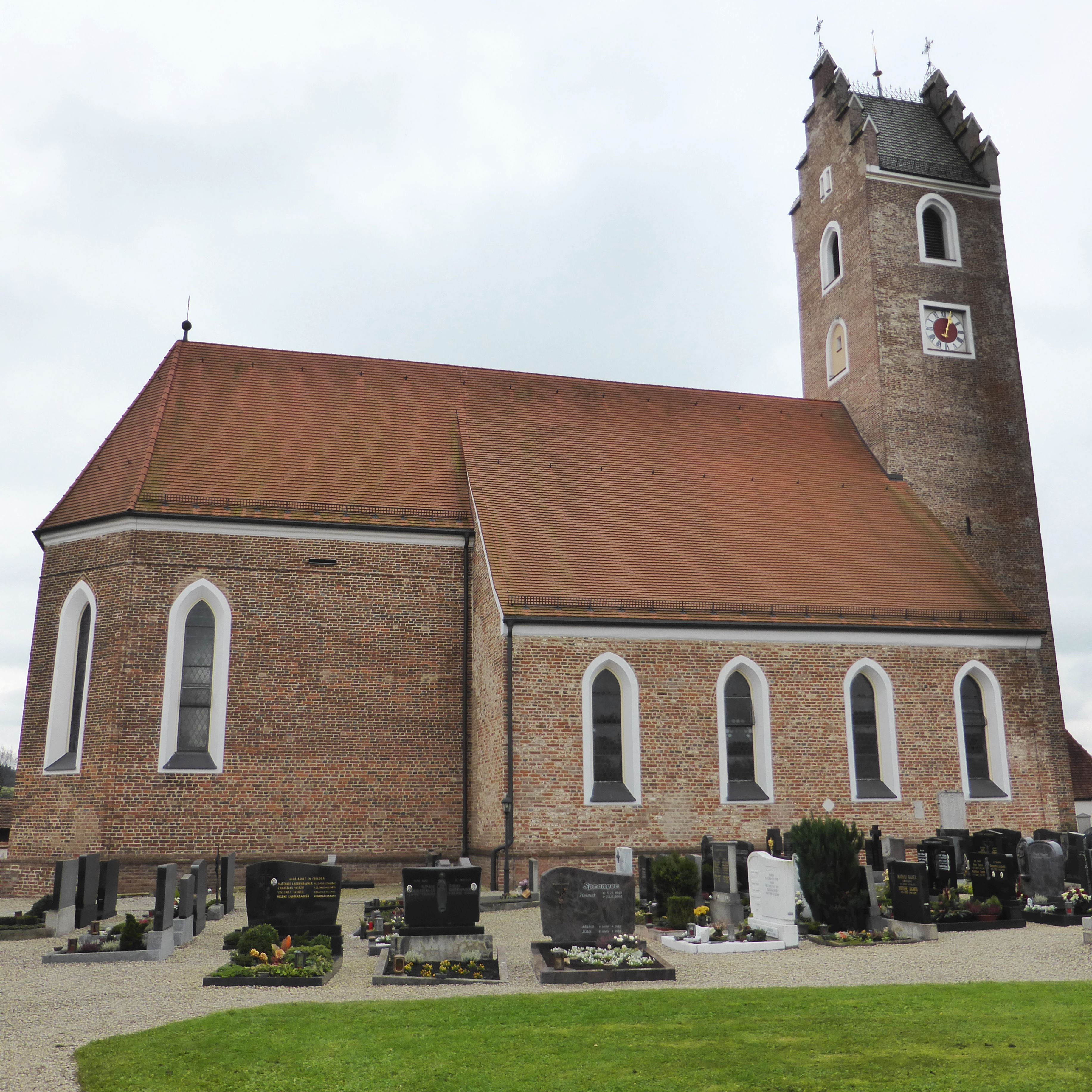 Oberdietfurt (Pfarrkirche St. Johannes der Täufer)